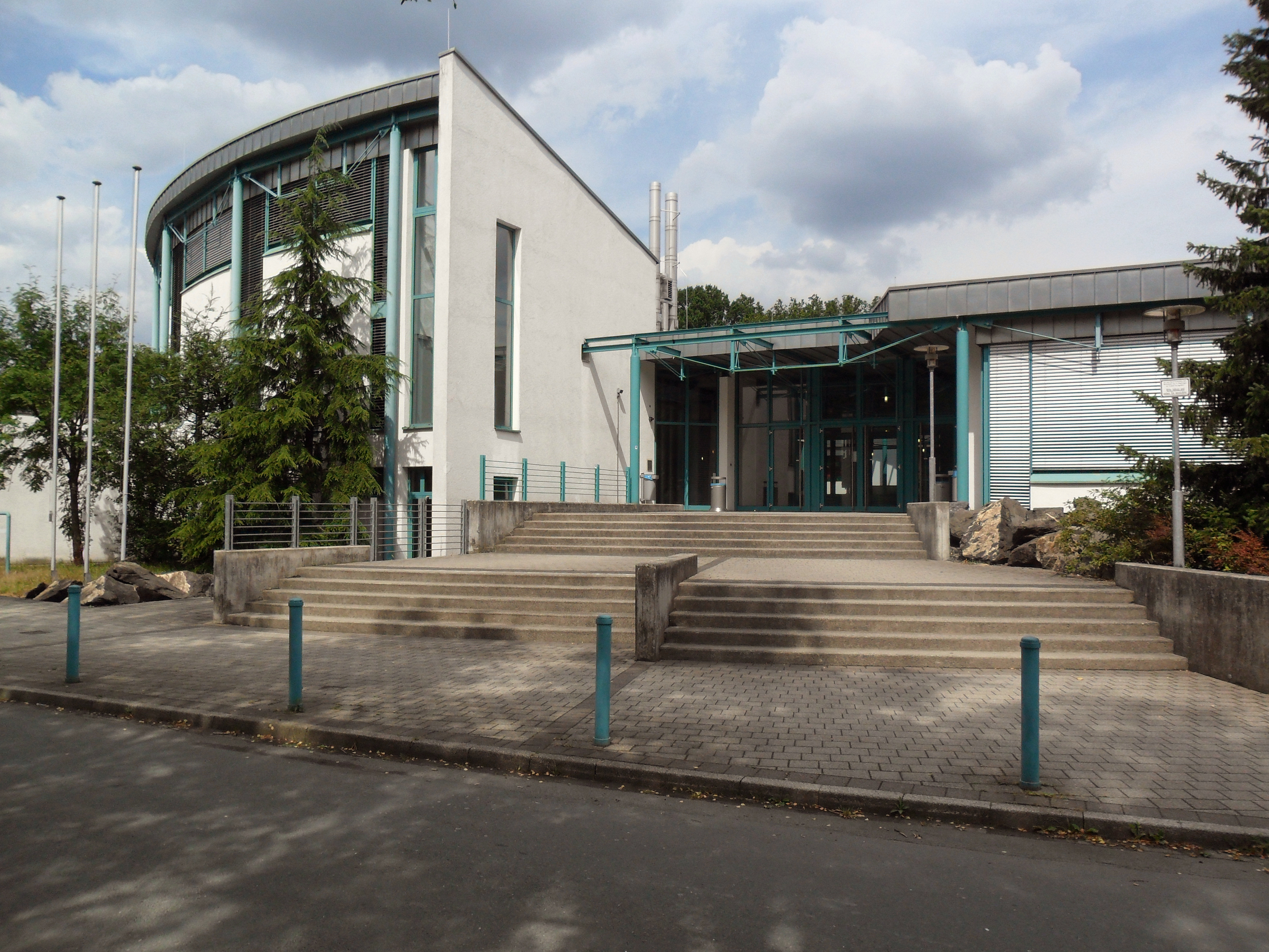 Fachhochschule Südwestfalen, Hauptgebäude in Meschede